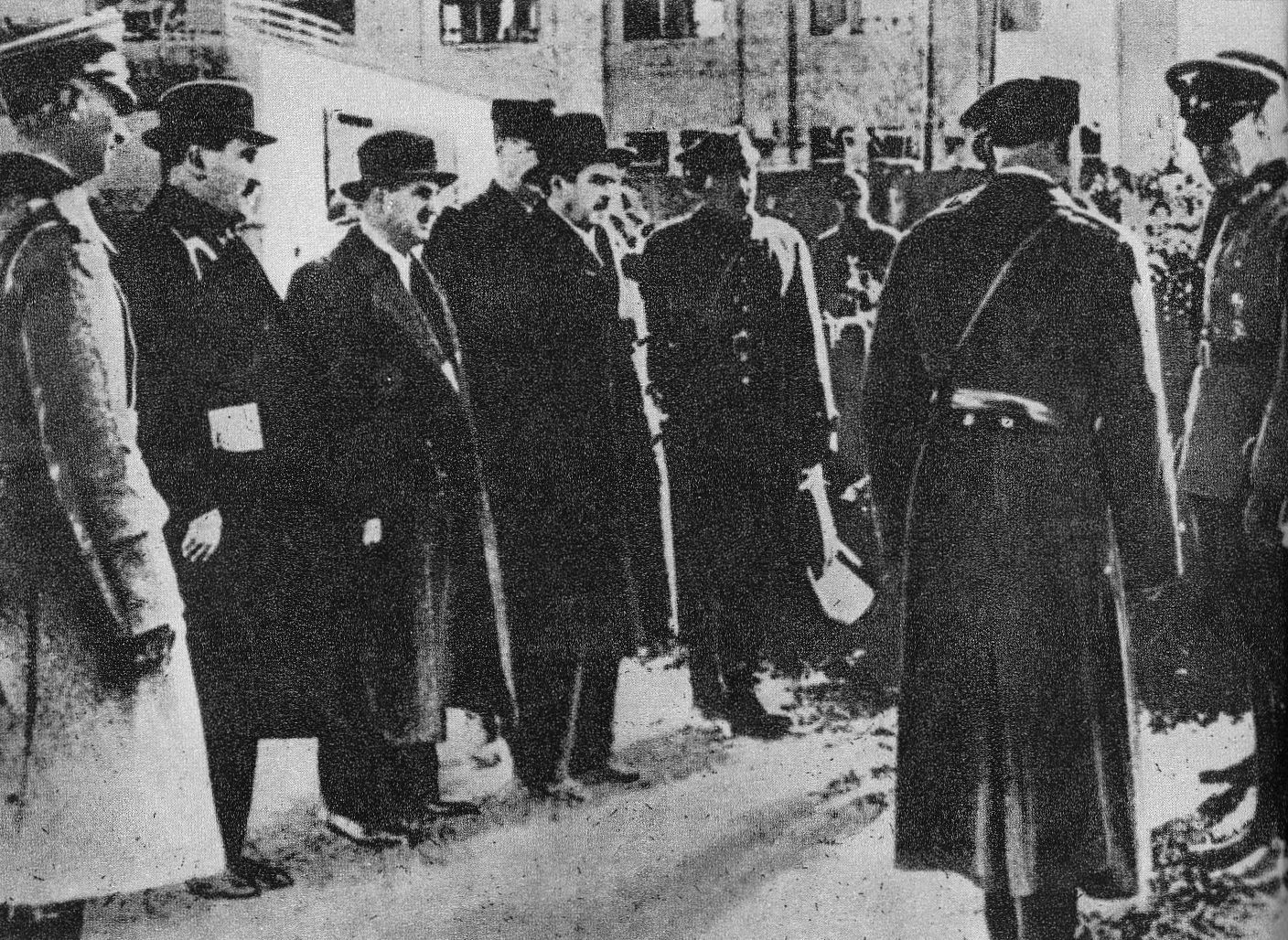 Rozmowy o kapitulacji Warszawy 28 września 1939. Czwarty z lewej Stefan Starzyński